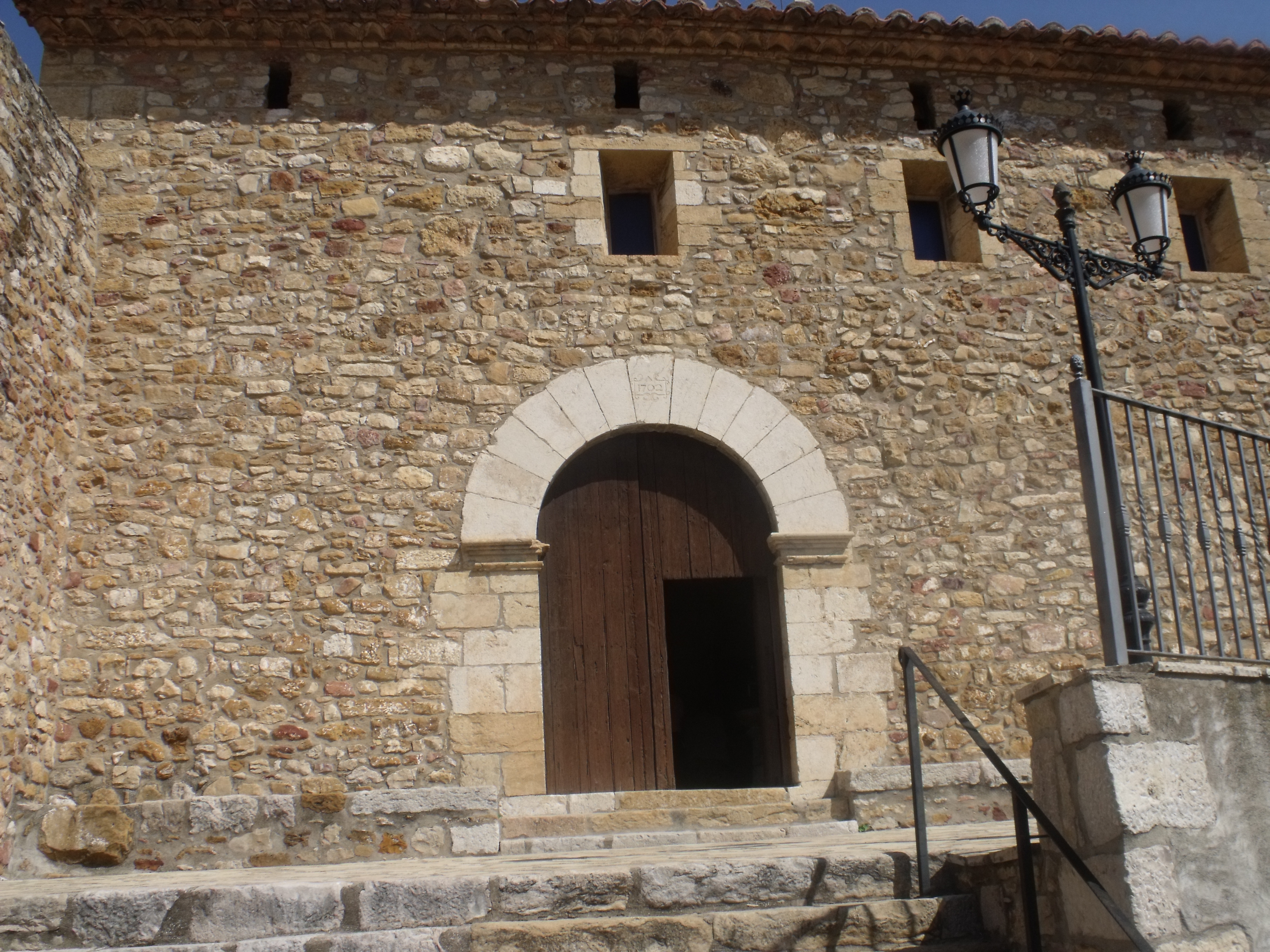 Fachada de la iglesia